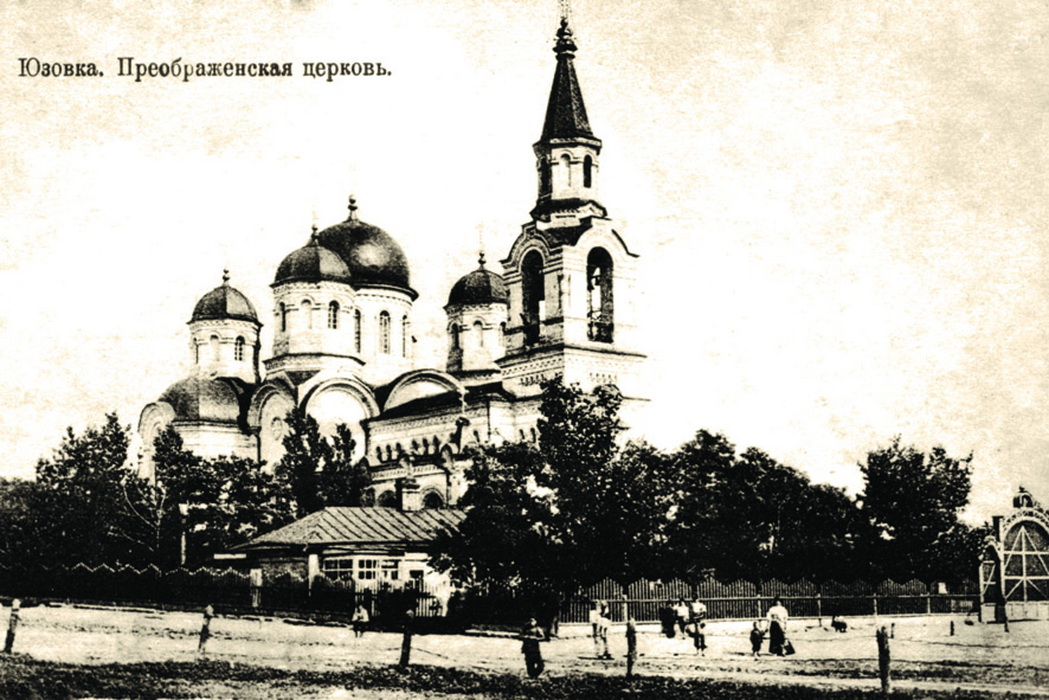 Фото Дореволюционной Юзовки